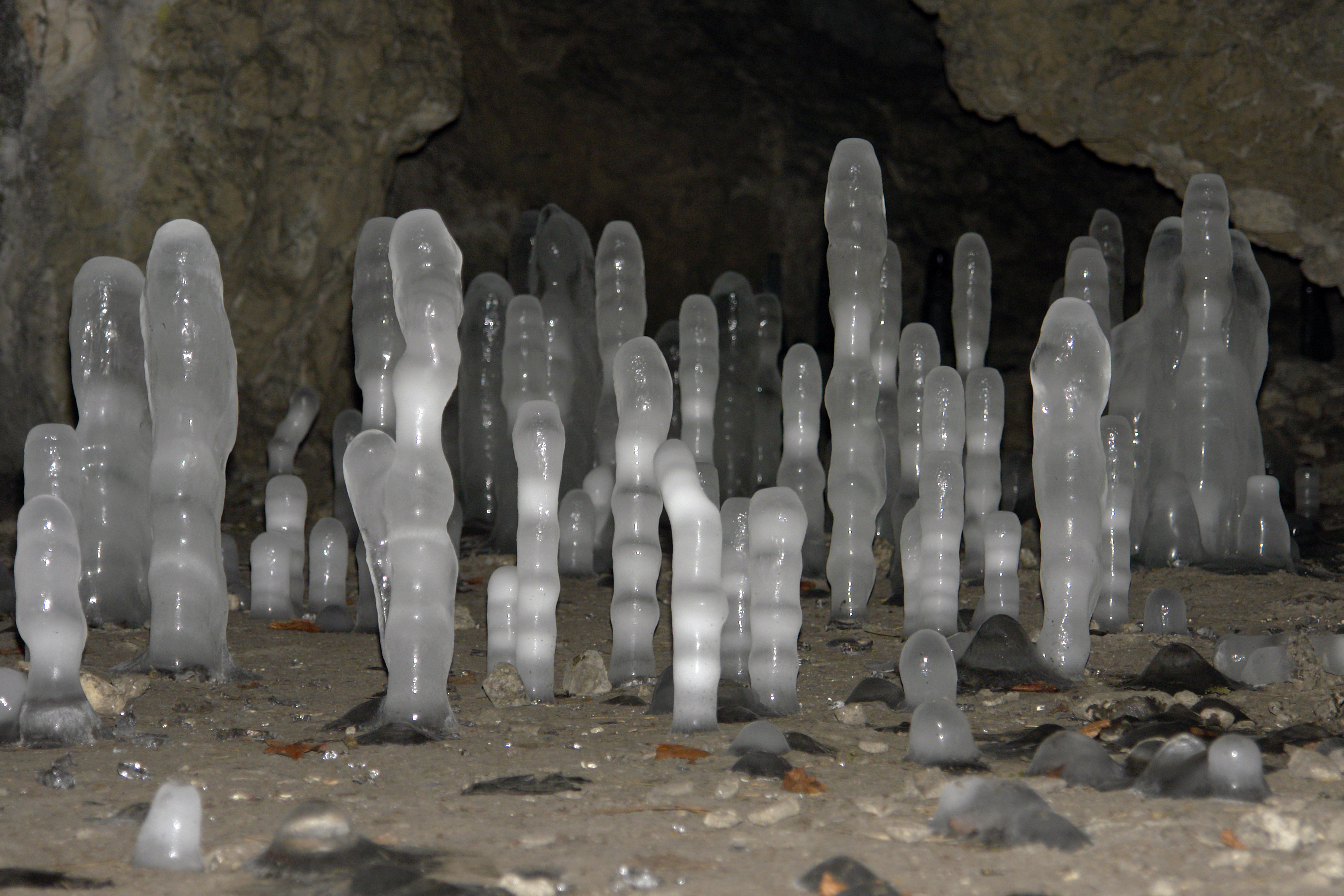 Mario Lorenz